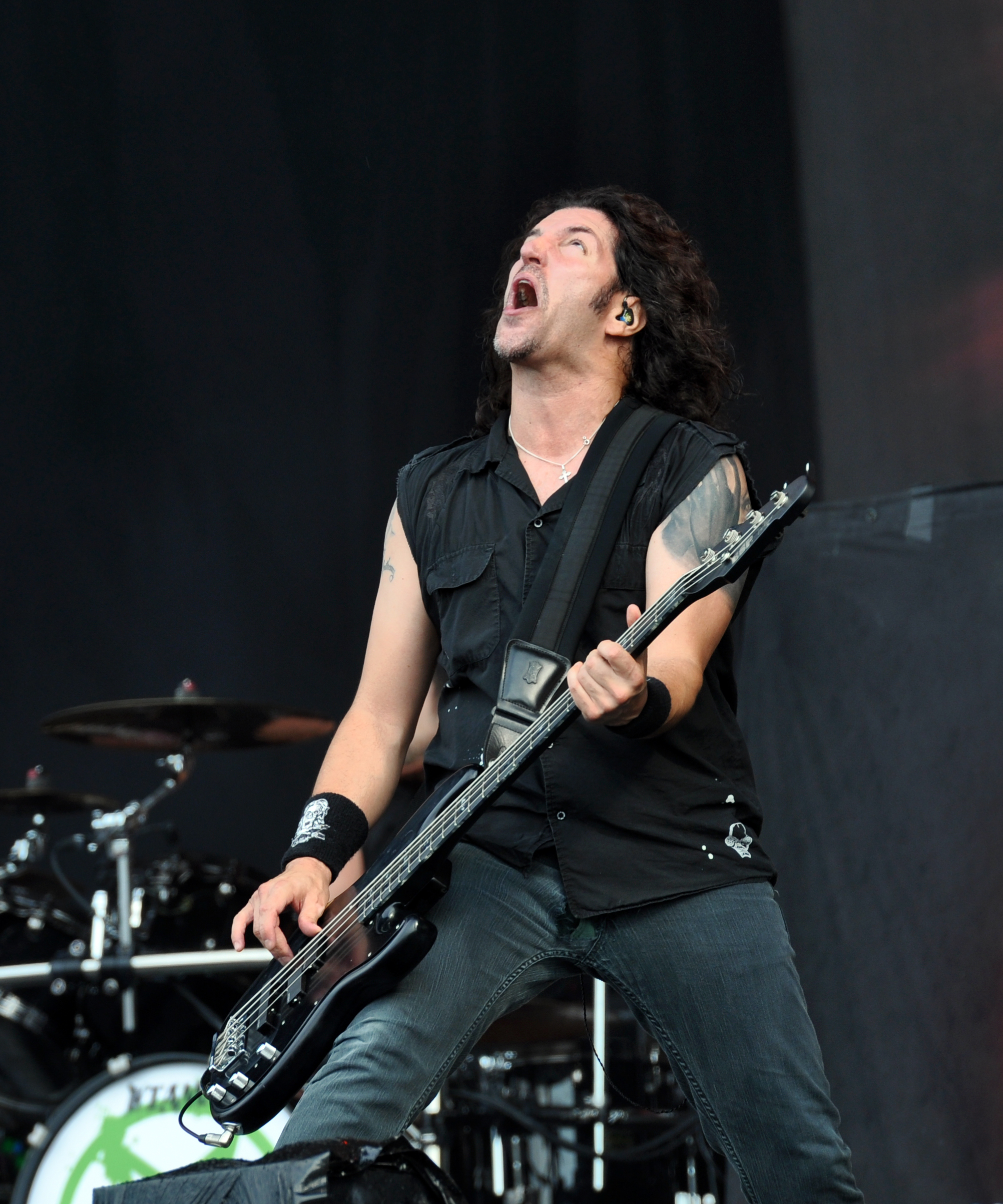 Frank Bello of Anthrax at Wacken Open Air 2013